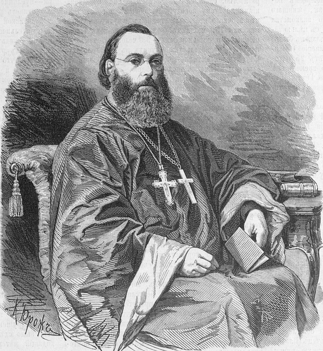 Владимир (Гетте), 1869 год